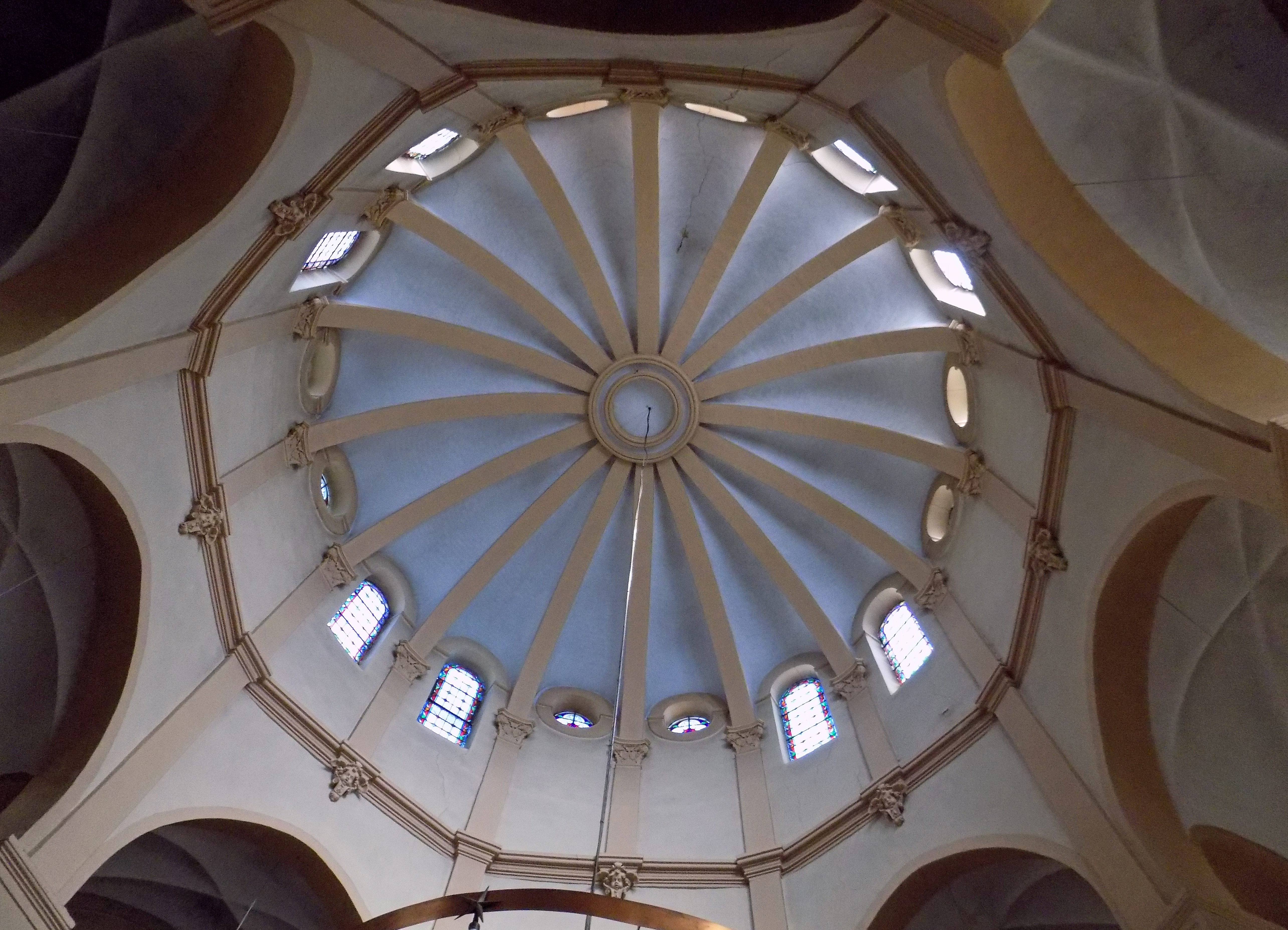 Basilique Notre-Dame-de-Bon-Secours de Saint-Avold, basilique mineure. Sanctuaire fondé au XVIe siècle et dédié à Notre-Dame-de-Bon-Secours. Pèlerinage marial. Vue intérieure de la coupole.